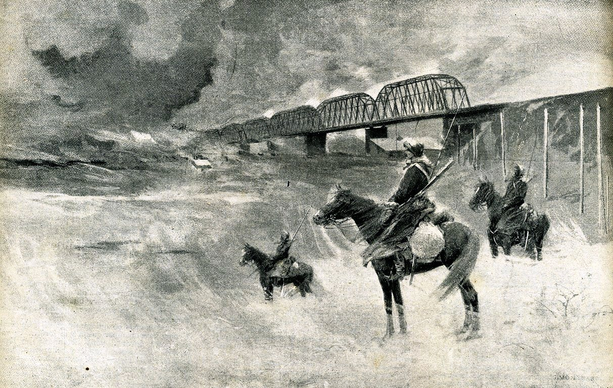 Un peloton de Cosaques gardant le pont de Sungari. Cest aux culées de ce pont que furent pendus un colonel et deux lieutenants japonais arrêtés comme espions